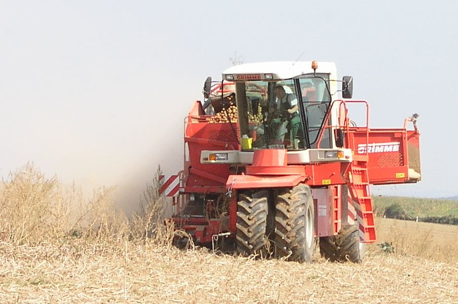 Selbstfahrender zweireihiger Grimme-Kartoffelvollernter (SF 150-60)